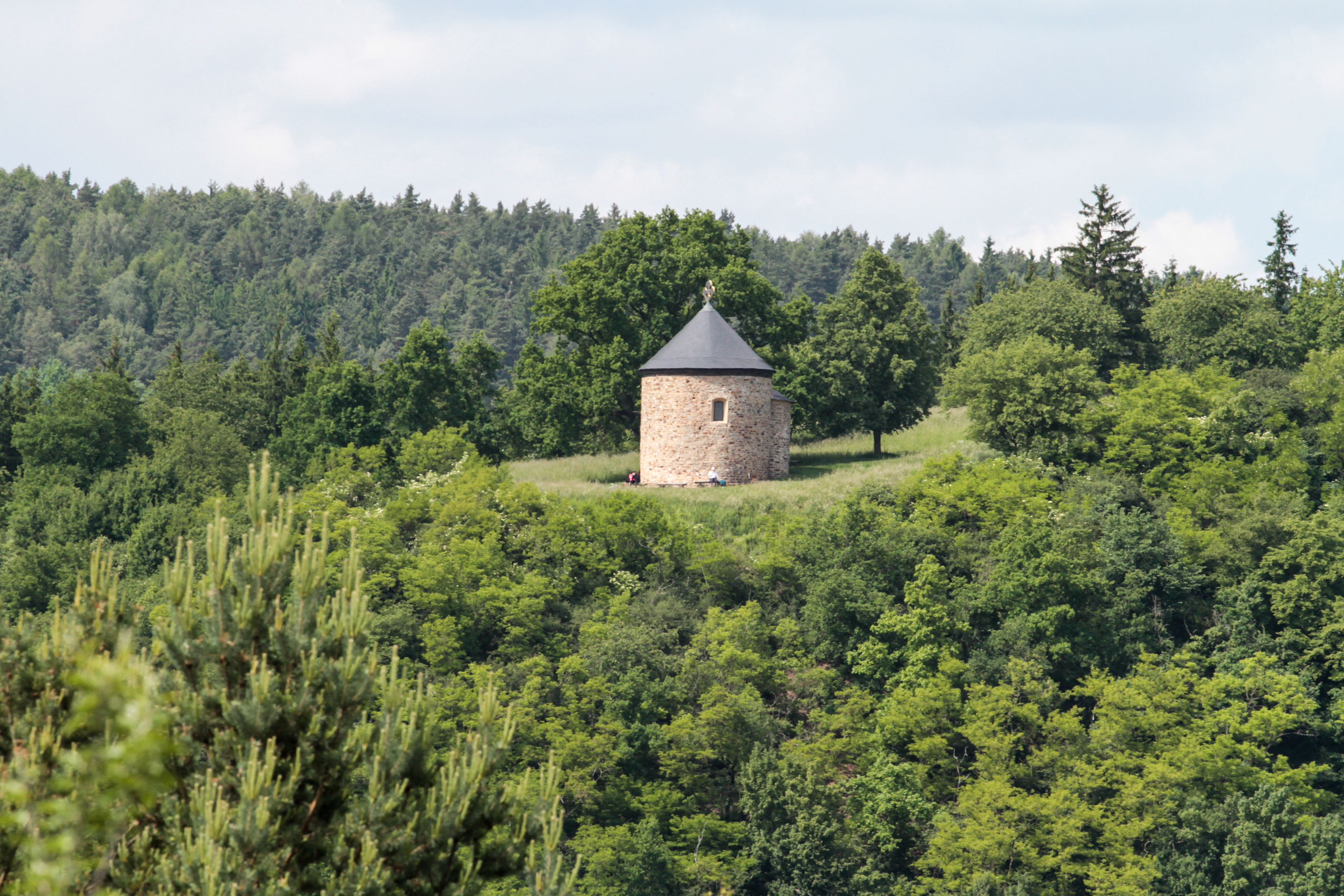 Hradiště Hůrka s rotundou svatého Petra, Starý Plzenec.